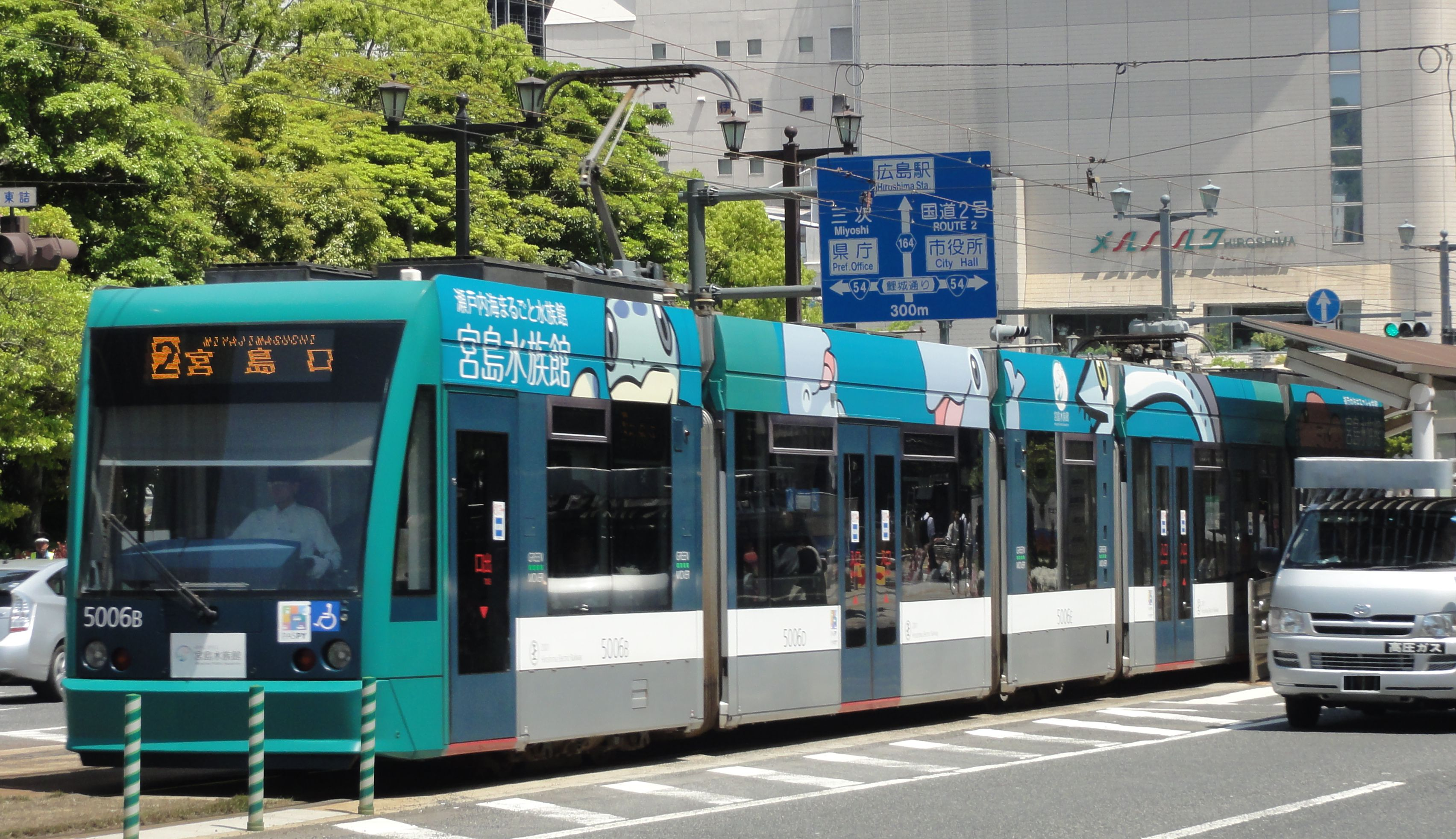 広島電鉄5000形路面電車